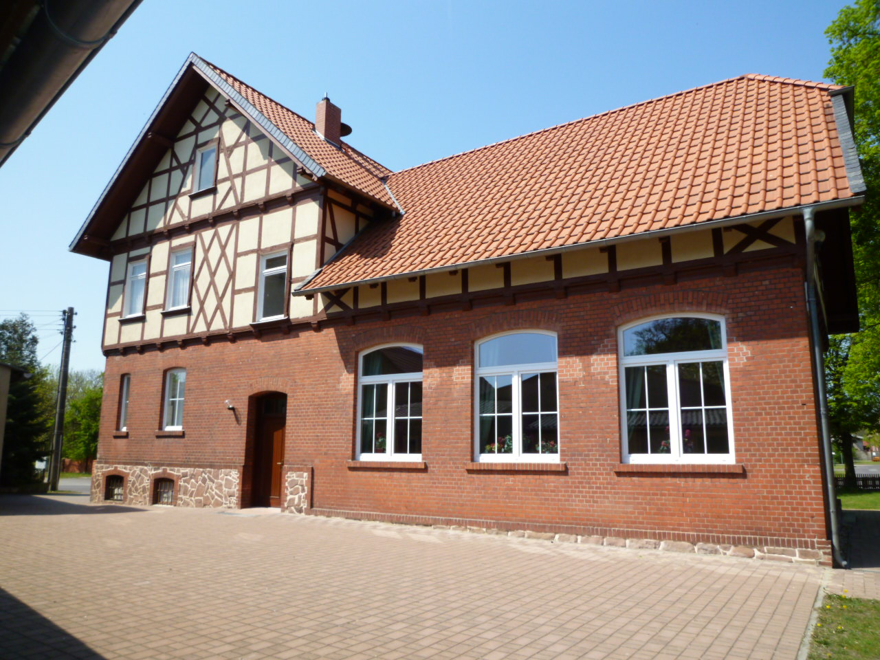 Das Berenbrocker Gemeinschaftshaus, ehemalige Ortsschule und Gemeindeverwaltung, nach der Eingliederung nach Calvörde fungiert es heute als Dorfgemeinschaftshaus, Aufnahme 02. Mai 2012